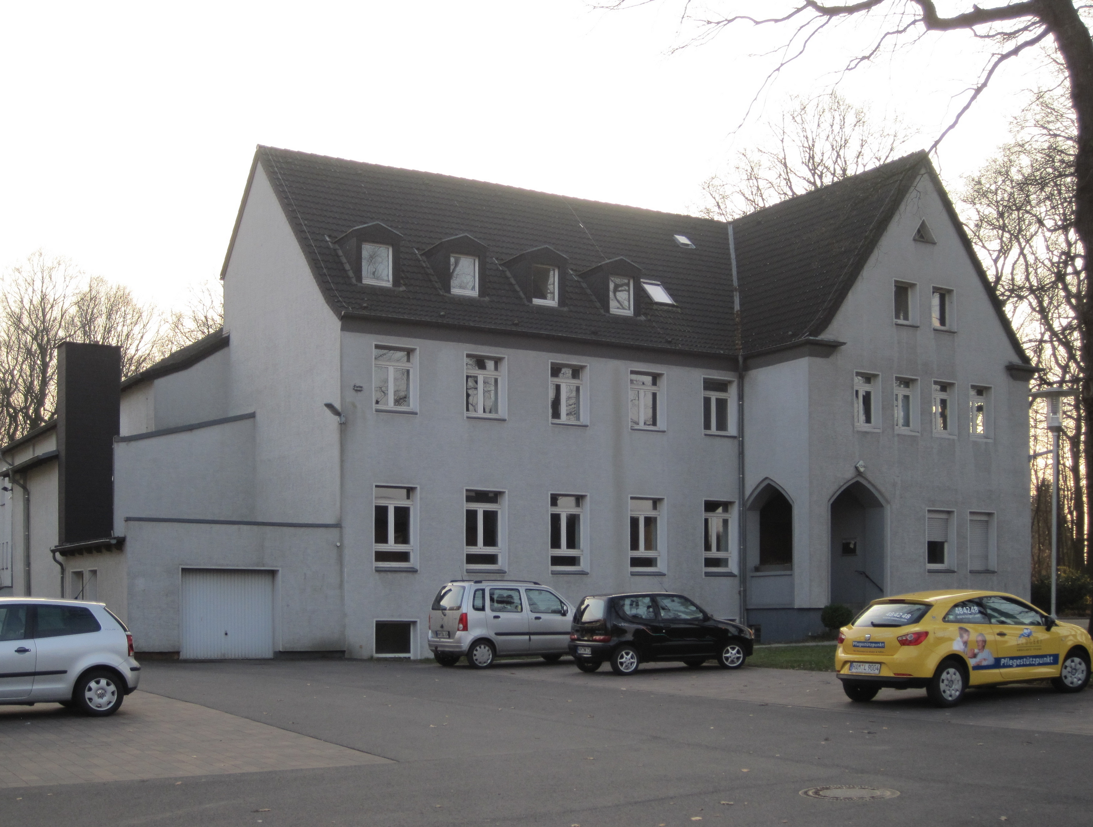 Das Foto zeigt das Gustav-Adolf-Haus, das zwischenzeitlich abgerissene Gemeindezentrum der Kreuzkirche in Hamm-Bockum-Hövel.